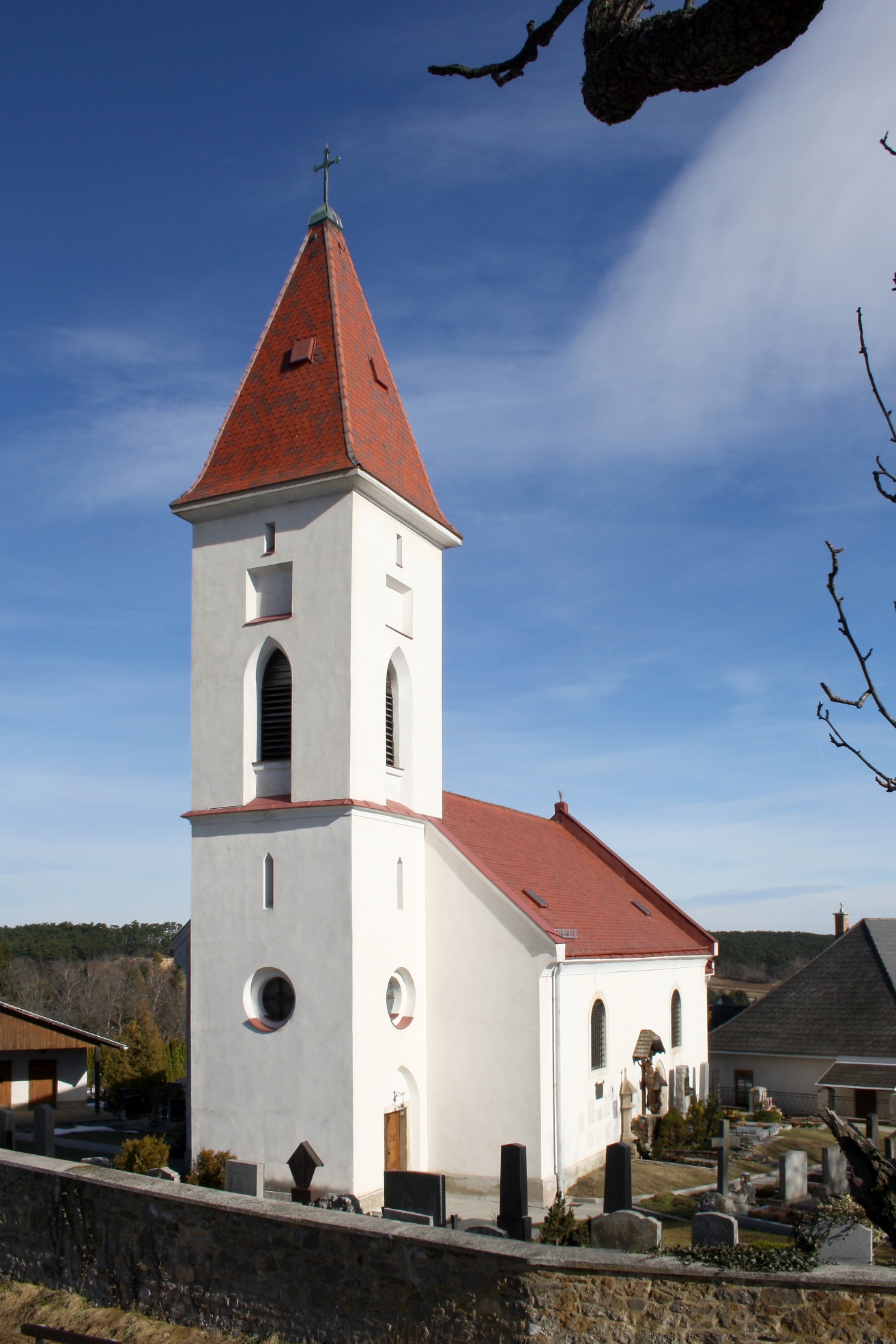 Westansicht der röm.-kath. Pfarrkirche von Dreistetten.